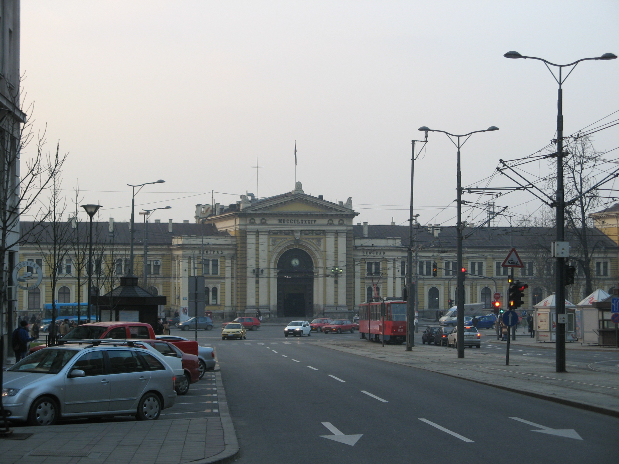 Железничка станица Београд–Главна